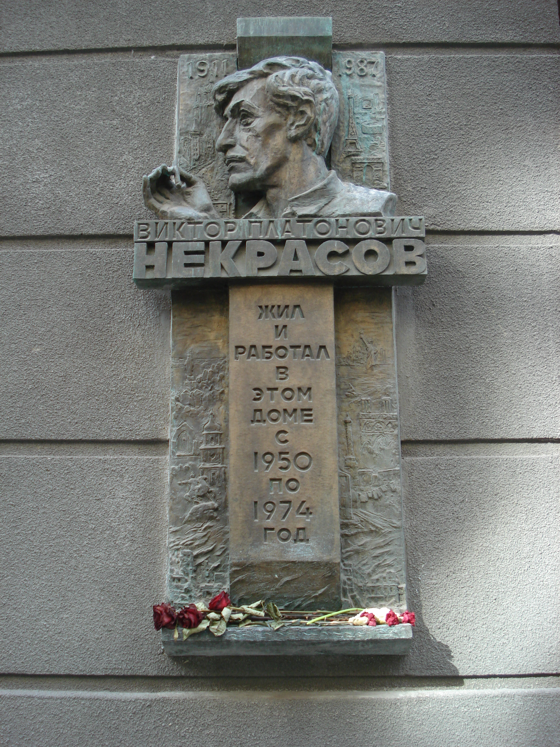 Мемориальная доска Виктору Платоновичу Некрасову в Киеве, Крещатик № 15 (Пассаж), где в 1950—1974 годах жил и работал писатель. Скульптор — Валентин Евгеньевич Селибер (1920-2011). Открыта в 1990 году.